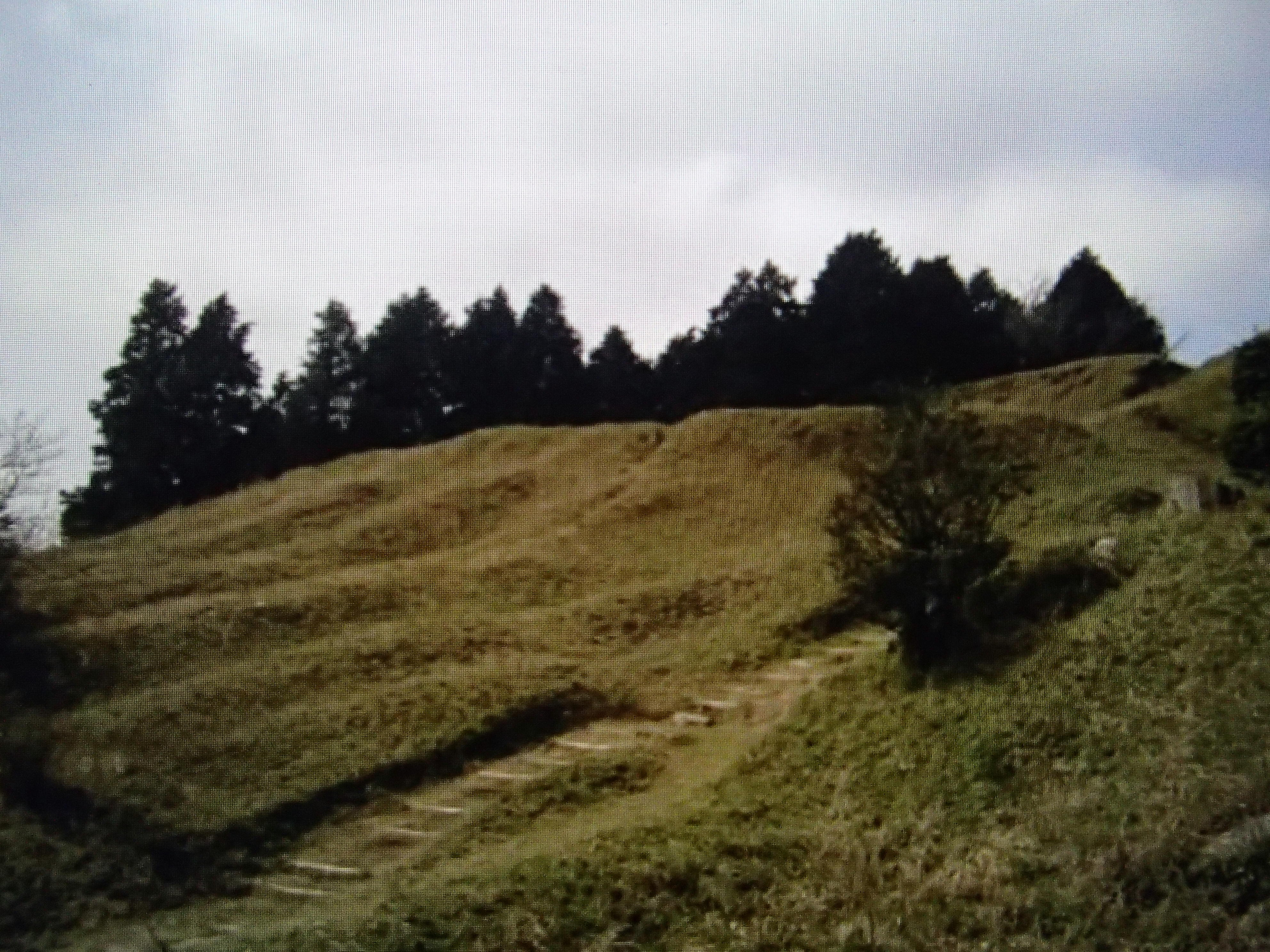 筑後鷹取城の連続空堀